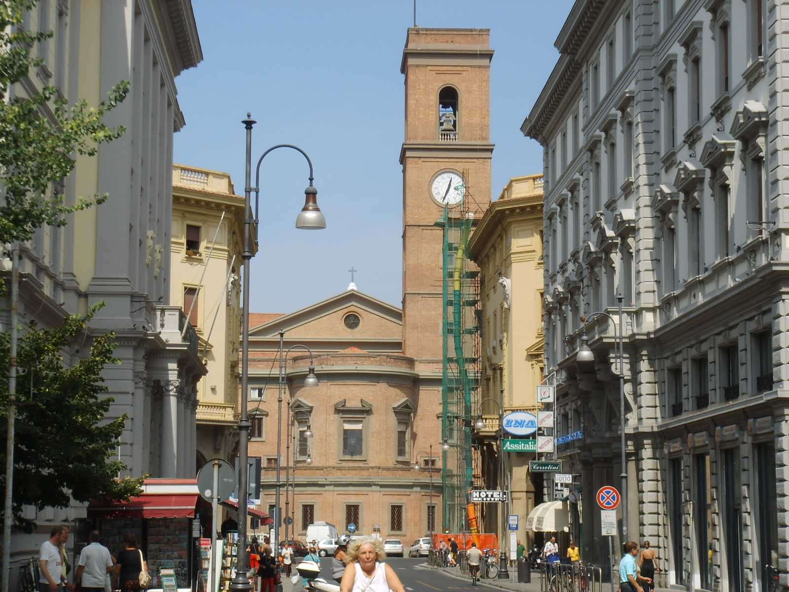 Livorno: abside del Duomo vista da Via Cairoli.